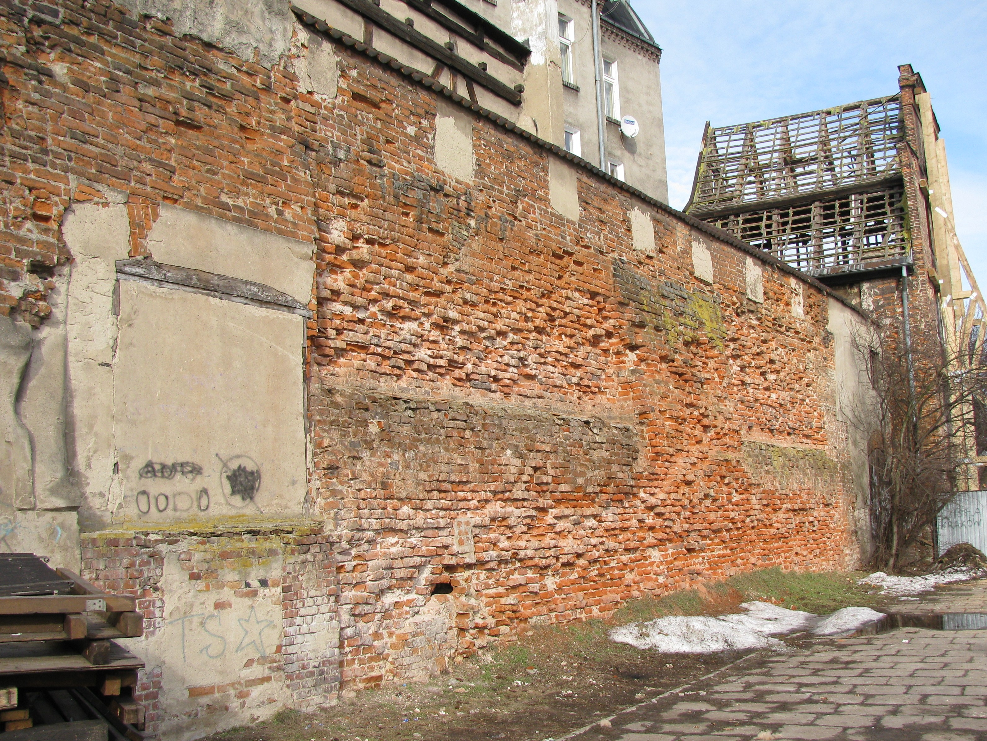 Średniowieczne mury miejskie. Gdańsk, ulica Wartka.